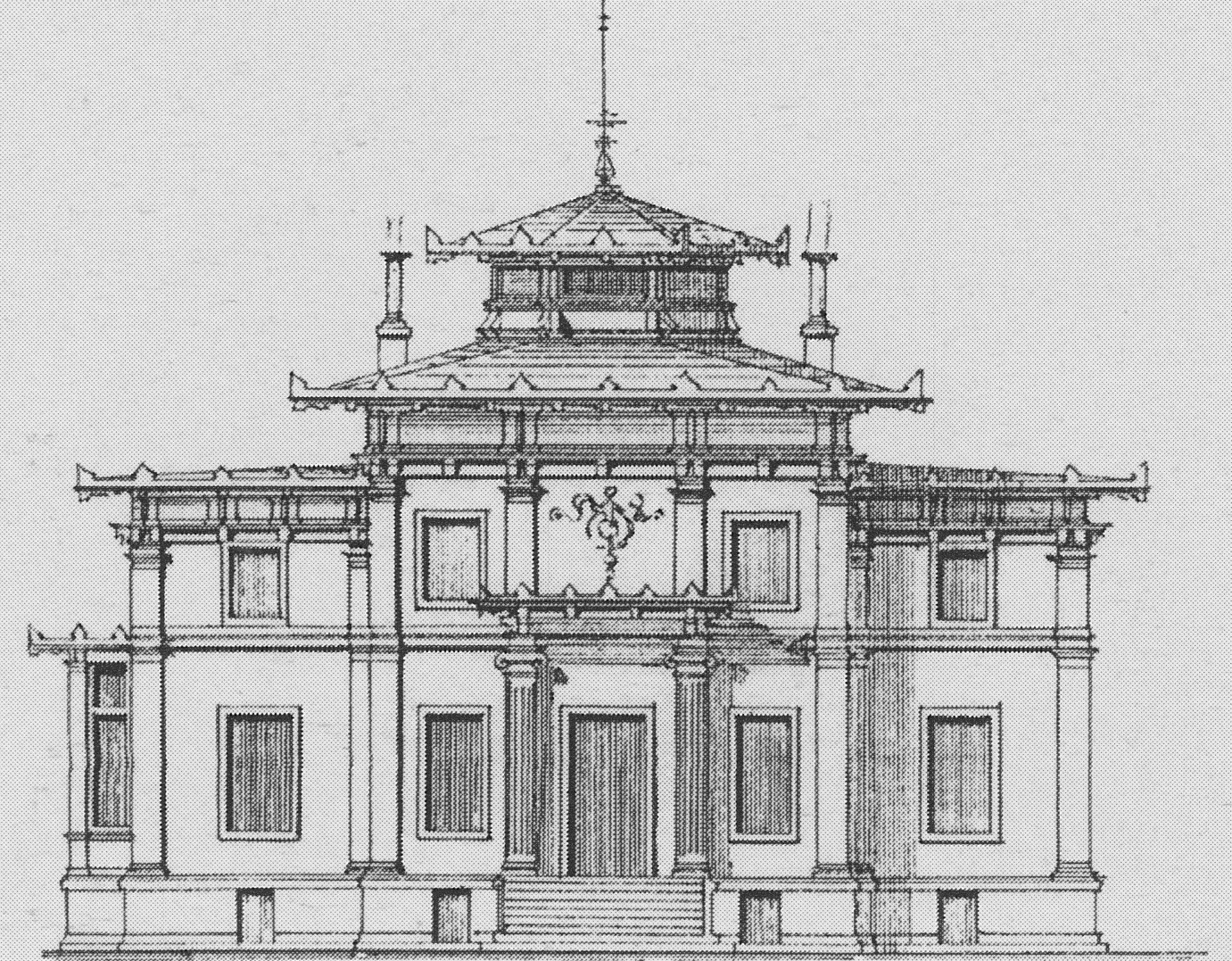 Radebeul Ludwig-Richter-Allee 6 Bauzeichnung 1875